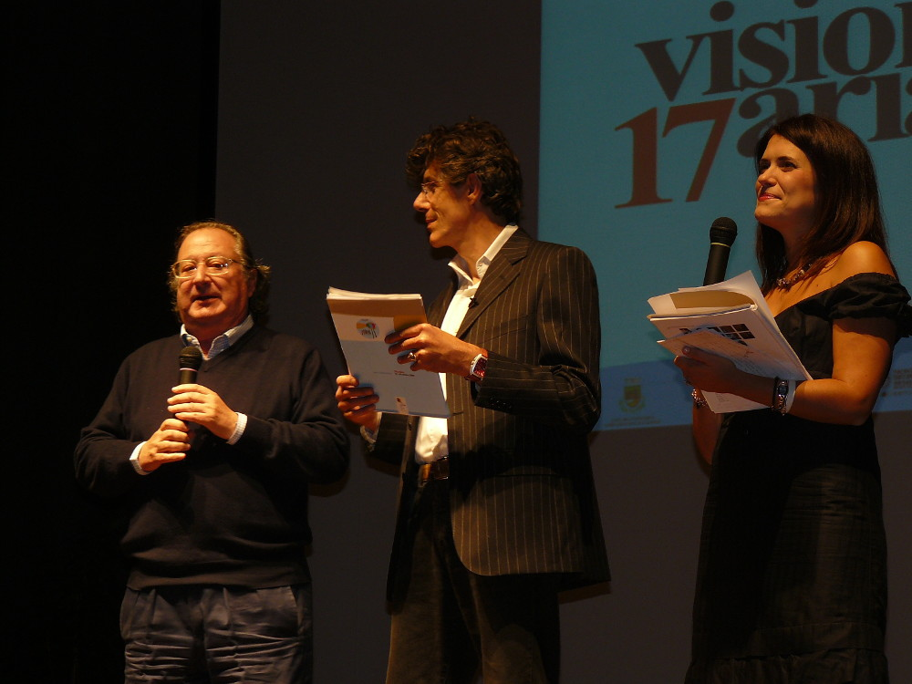 Visionaria 2008. Cesare Gigli in giuria sul palco per presentare i vincitori